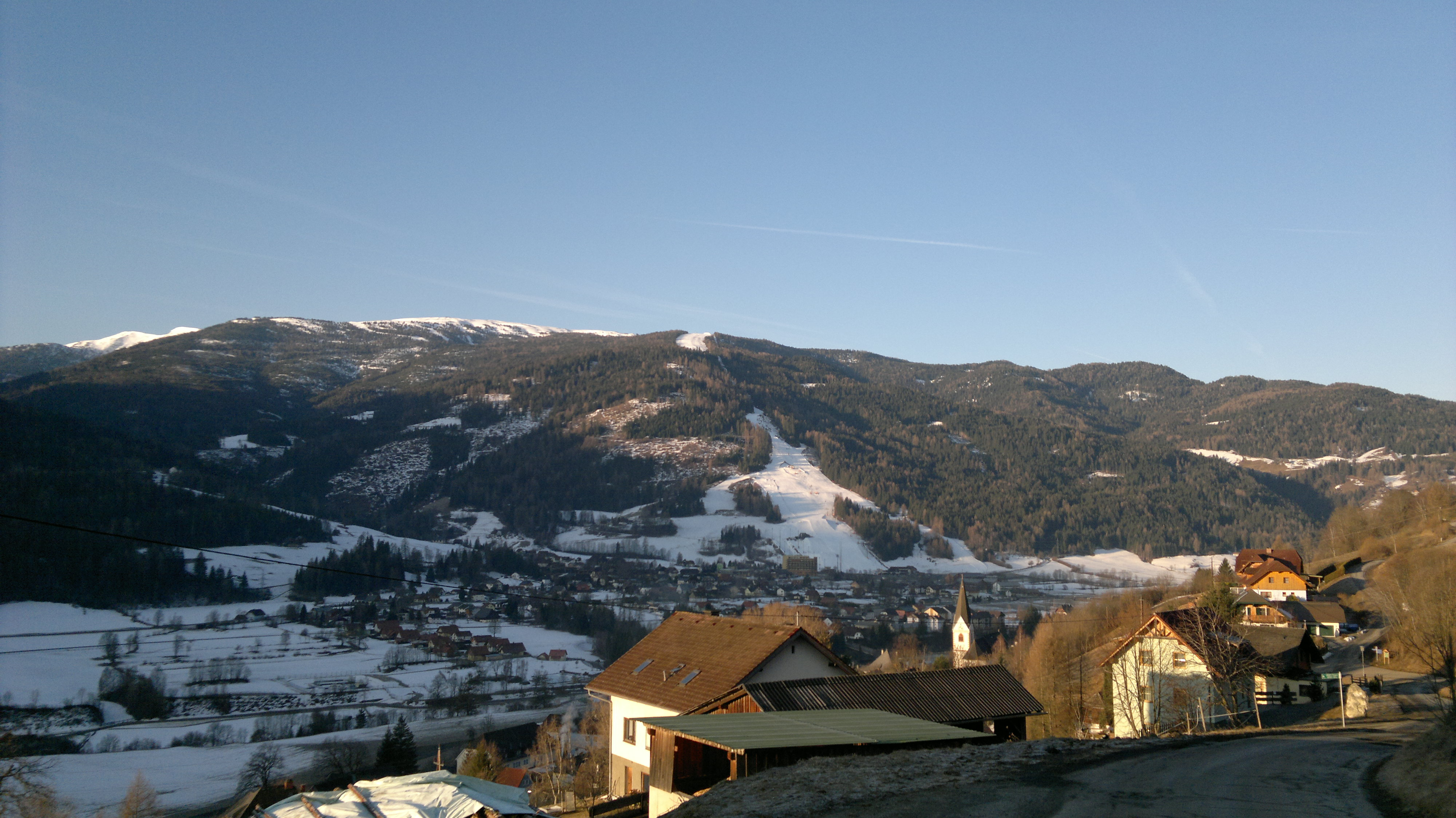 Blick auf den Kreischberg, Bezirk Murau. Im Vordergrund die Ortschaft St. Georgen, dahinter zum Kreischberg St. Lorenzen.